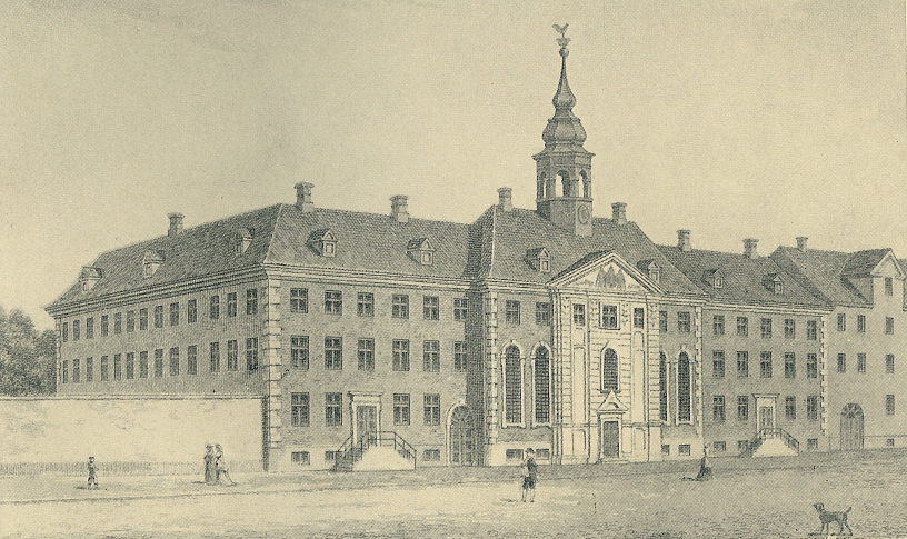 Waisenhuset i København som det så ud fra ombygningen i 1765 til branden i 1795.